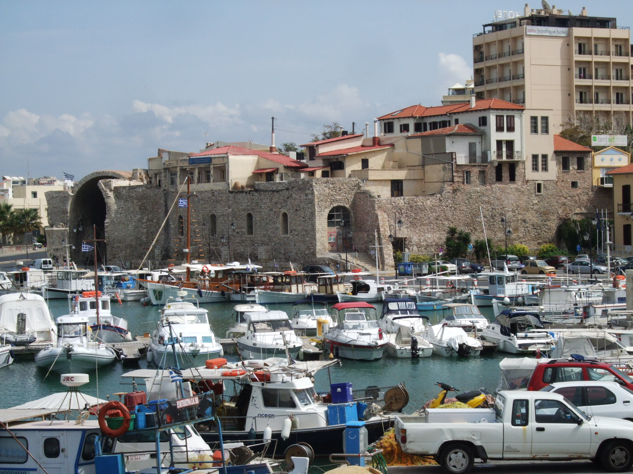 Weneckie arsenały w porcie, Heraklion.